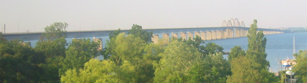 Storstromsbroen bei Vordingborg